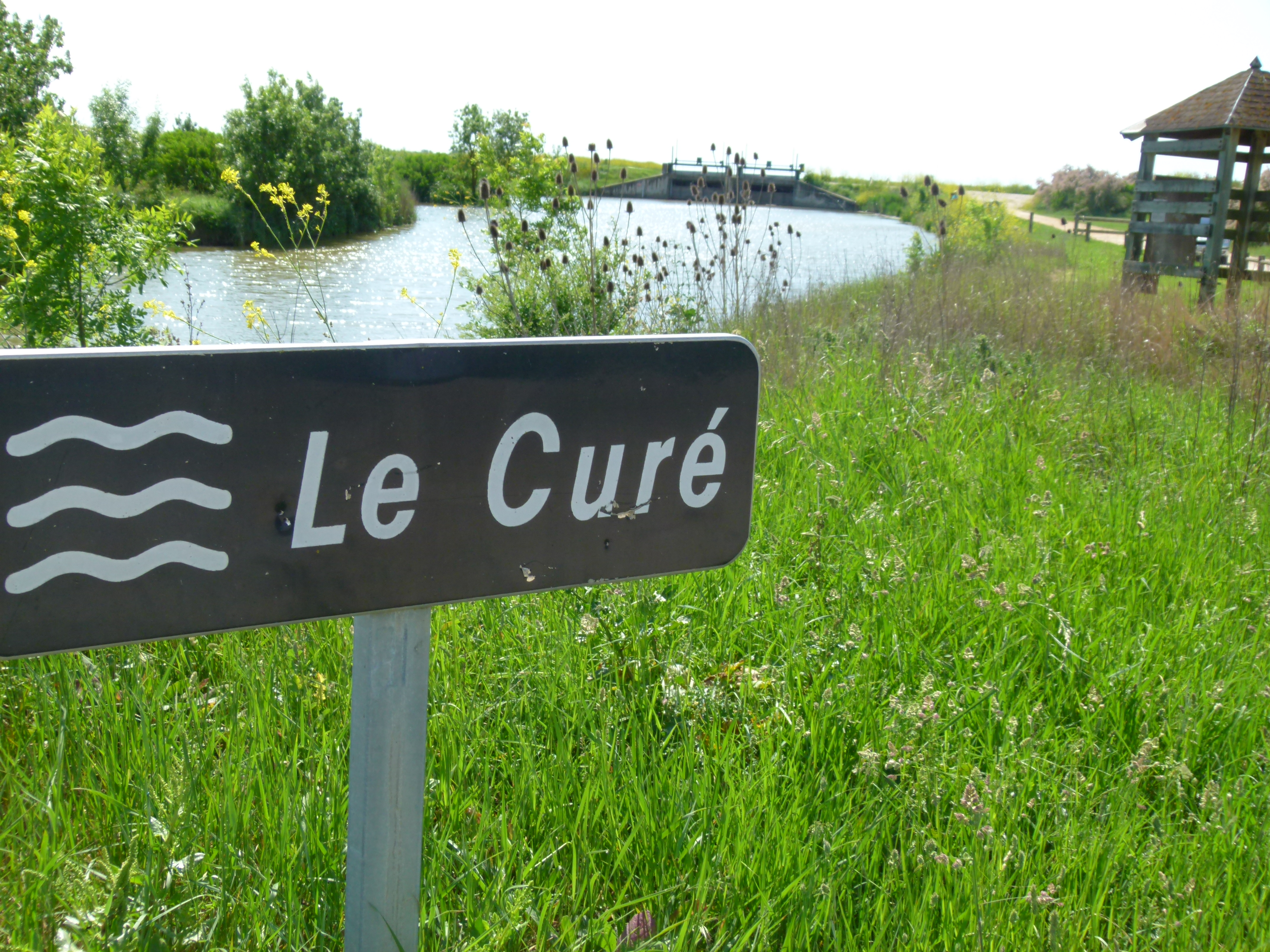 Le canal du Curé signalé par un panneau